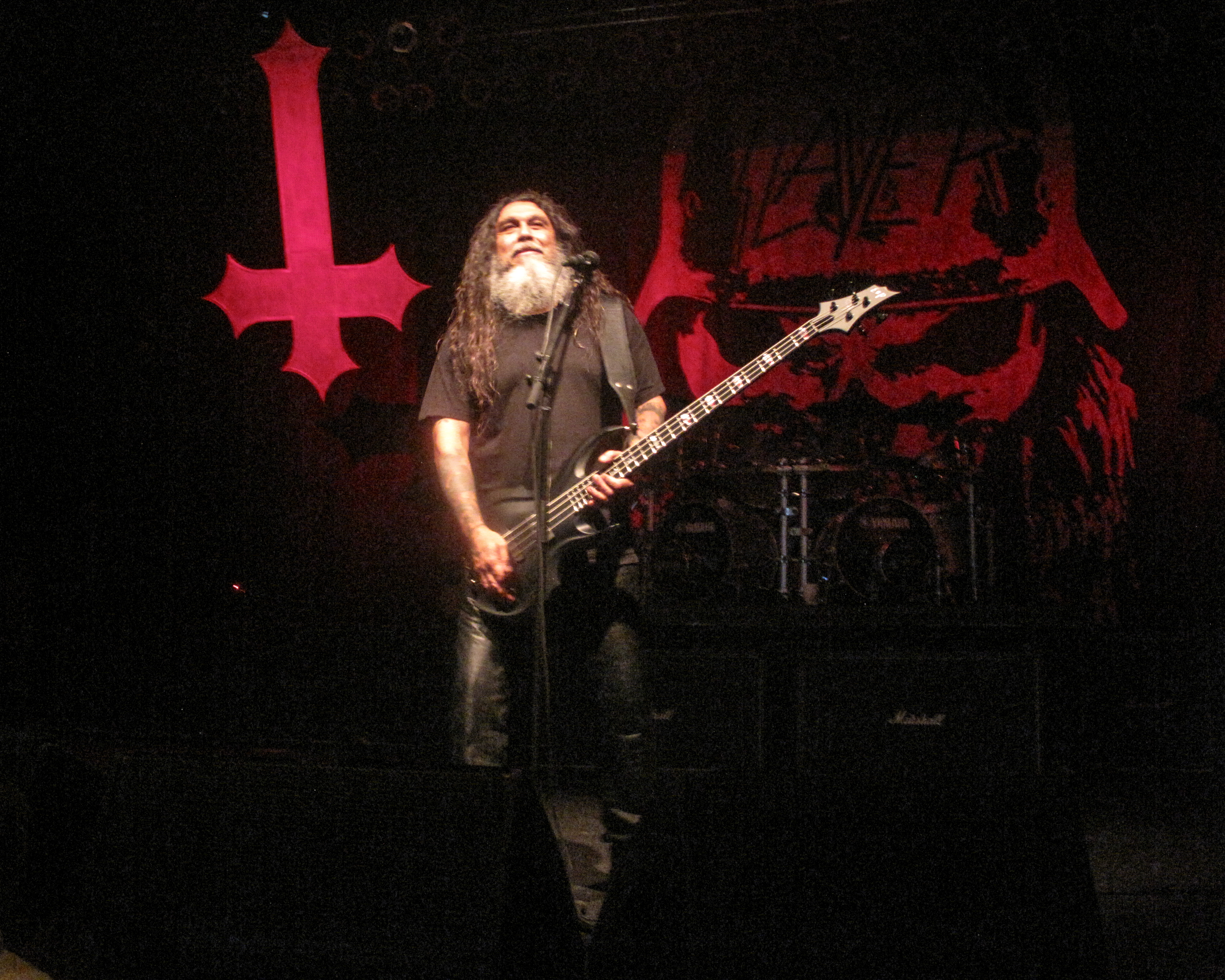 Tom Araya in 2015-06-17